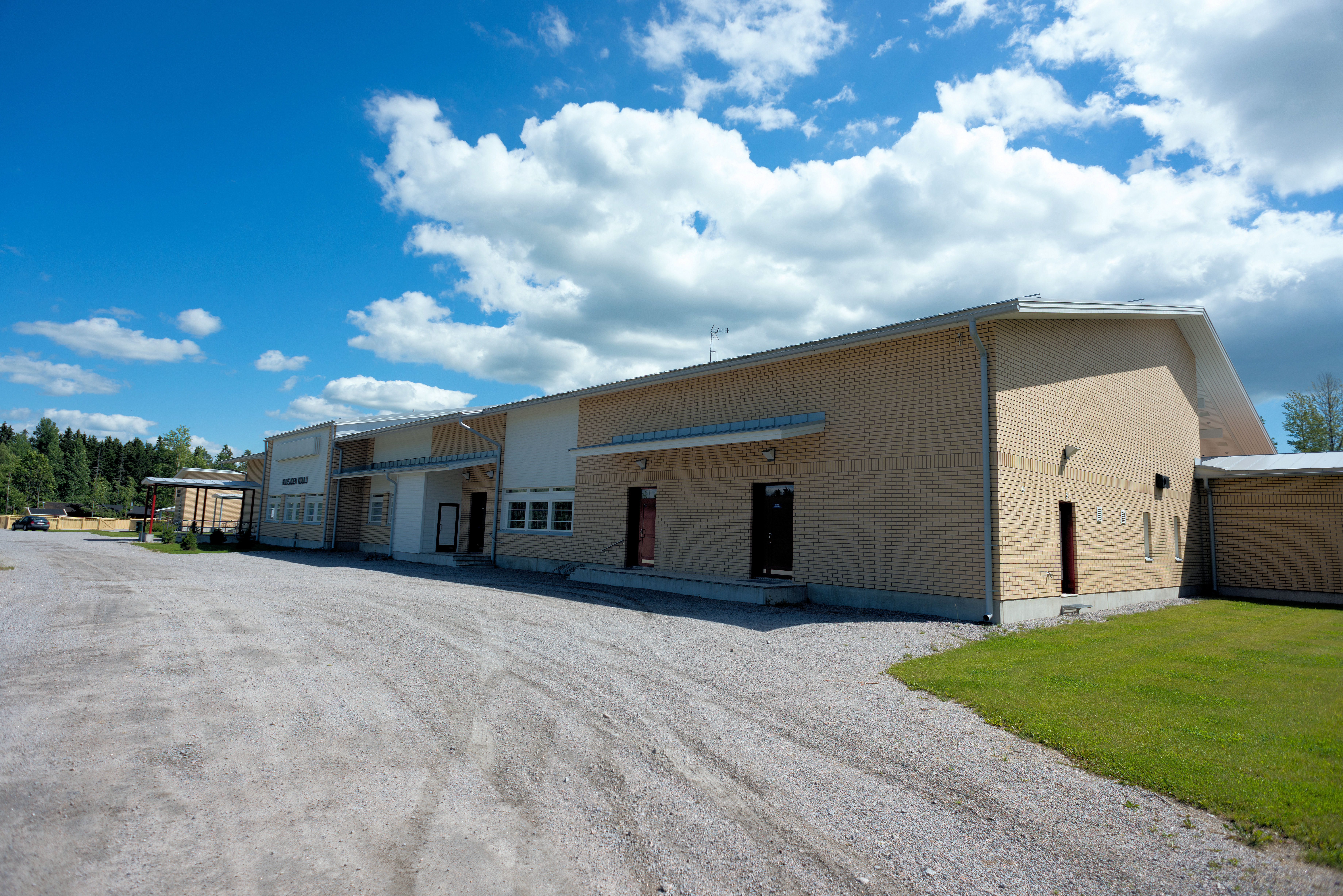 Kuusjoen koulu